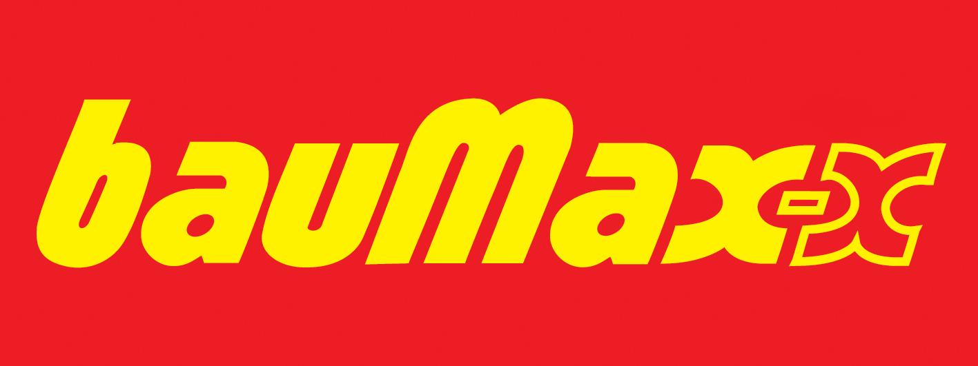 bauMax logo